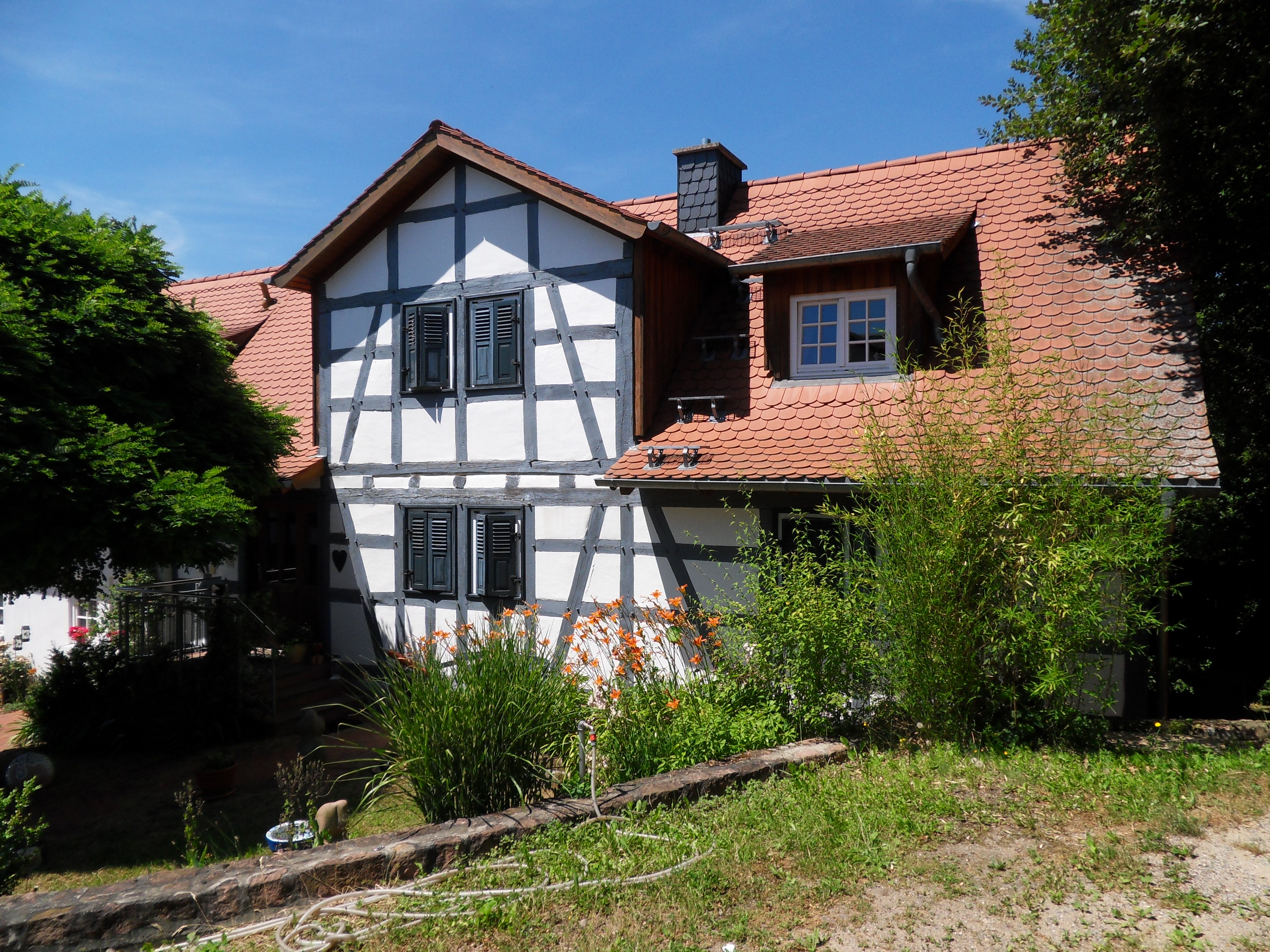 Denkmalgeschütztes so genanntes Einhaus aus konstruktivem Fachwerk mit einem Zwerchhaus im Mittelteil in der Kirch-Brombacher Straße 19 in Böllstein im Odenwald